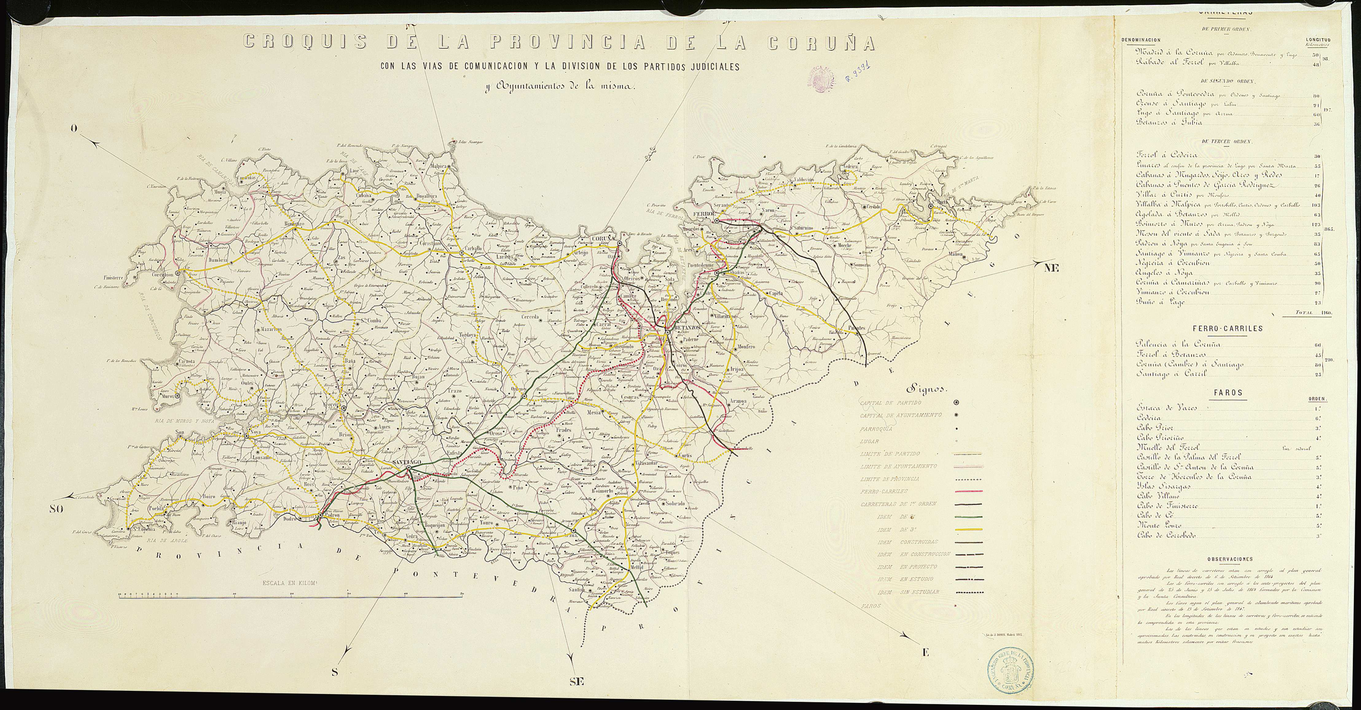 Mapa da provincia da Coruña dividida en concellos e partidos xudiciais no ano 1865. Tamén se amosan as estradas e os ferrocarrís.